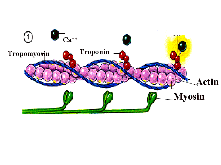 השותפים בתהליך: מיוזין, אקטין, טרופומיוזין, טרופונין ויוני סידן